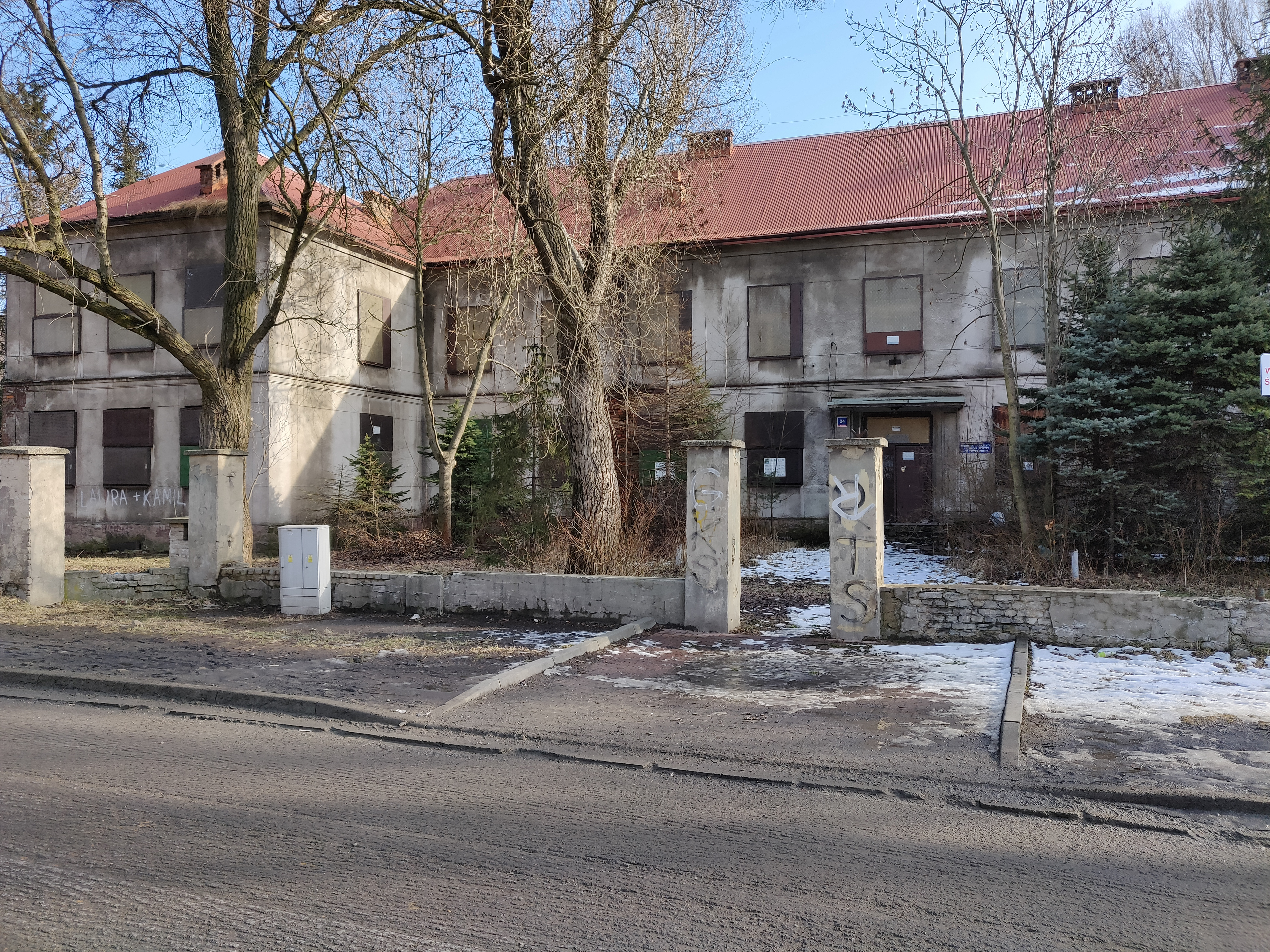 Budynek przy ul. Janusza Korczaka 24 w Katowicach